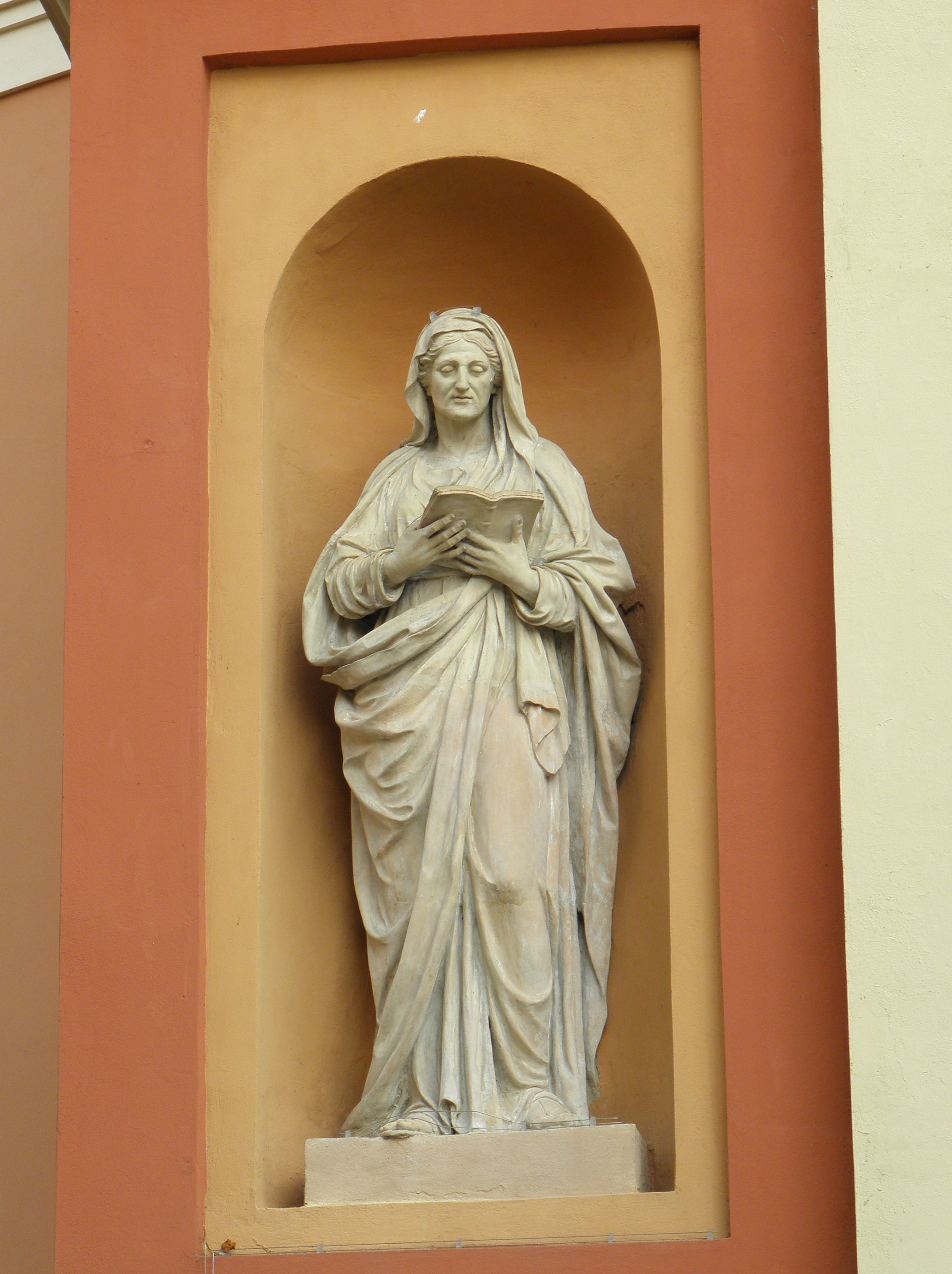 Baricella: la statua di Sant'Anna che orna la nicchia di sinistra sulla facciata della chiesa parrocchiale di Santa Maria.